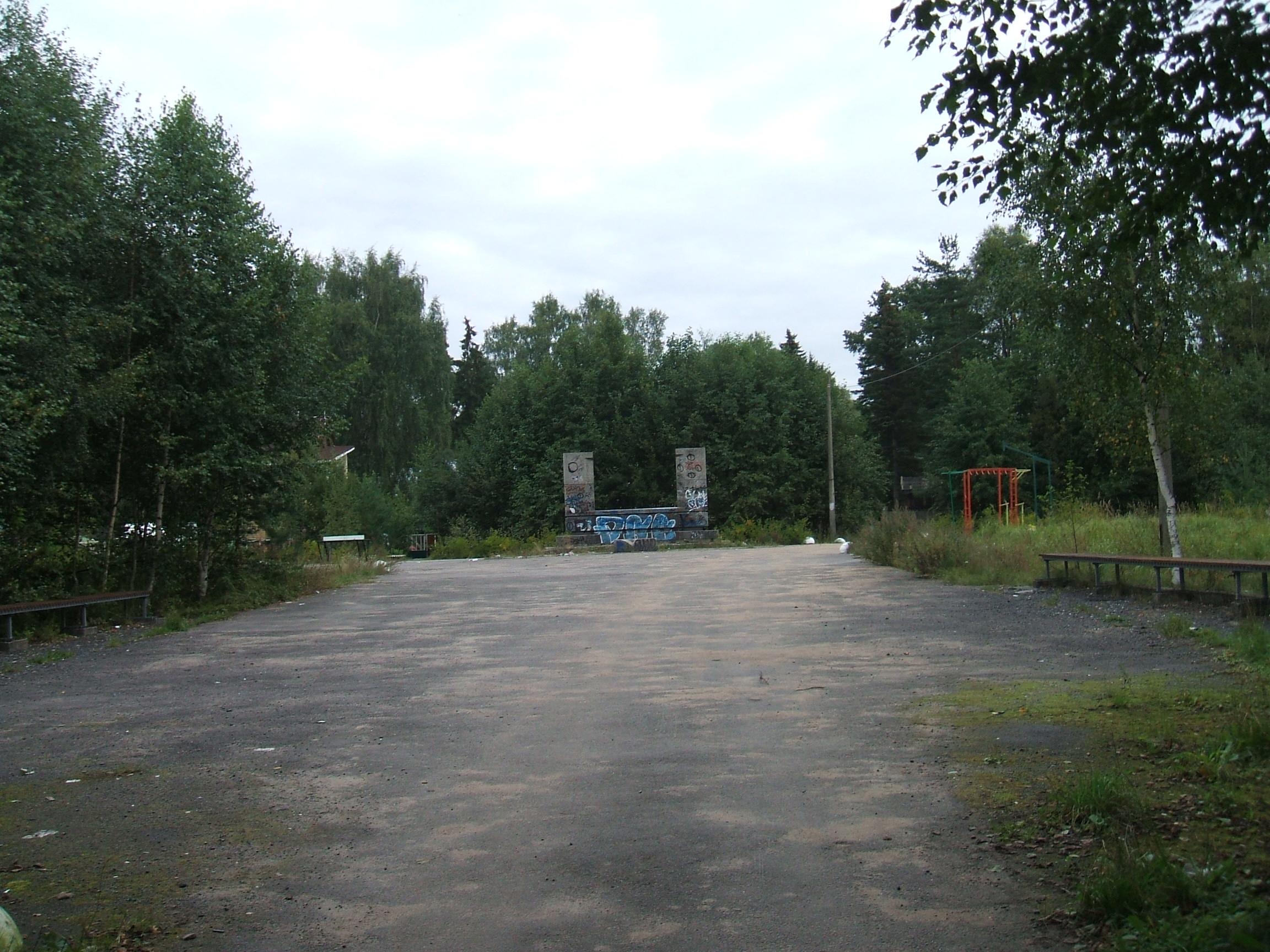 скверы Репино СПб